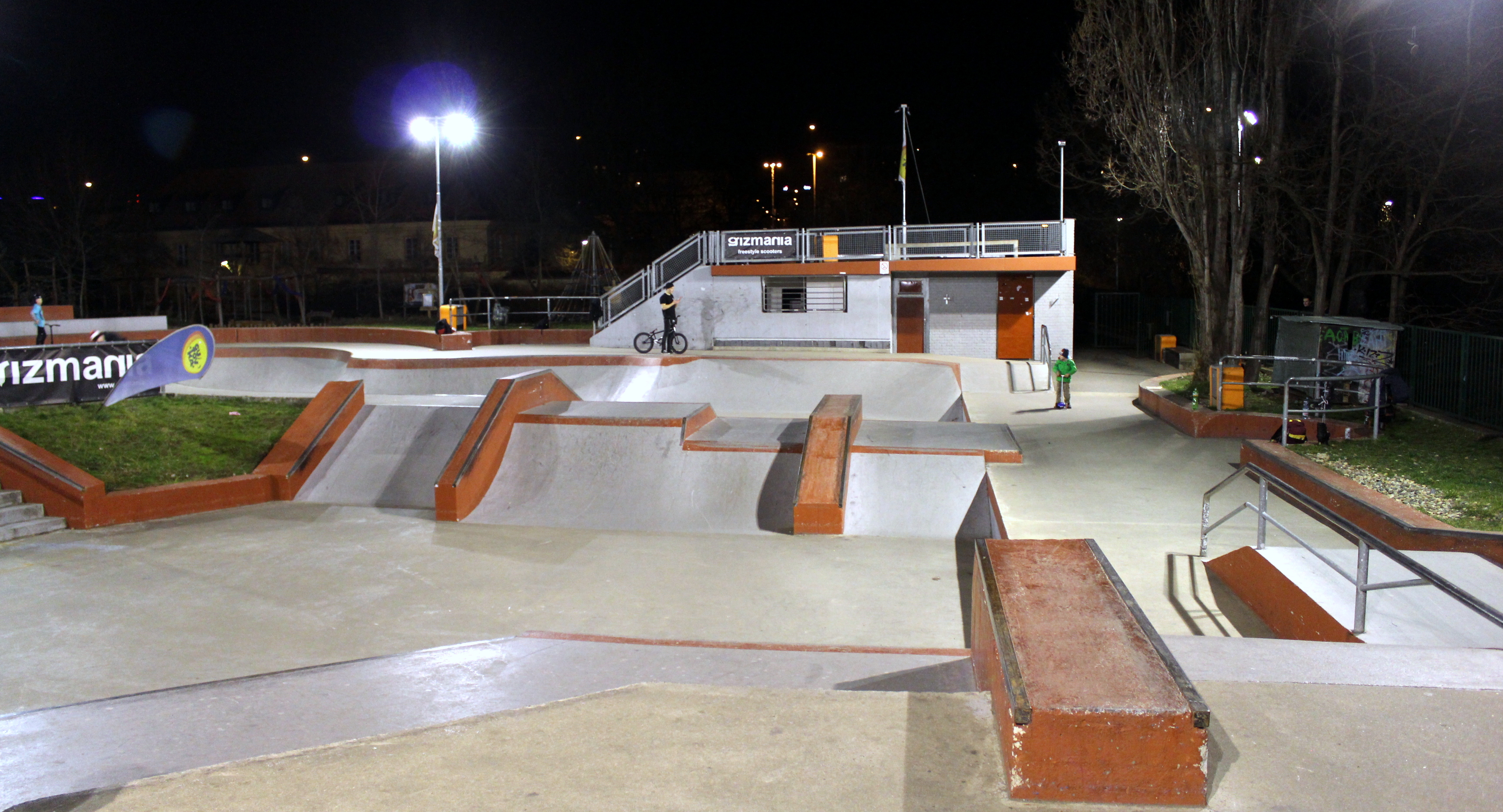 Gutovka